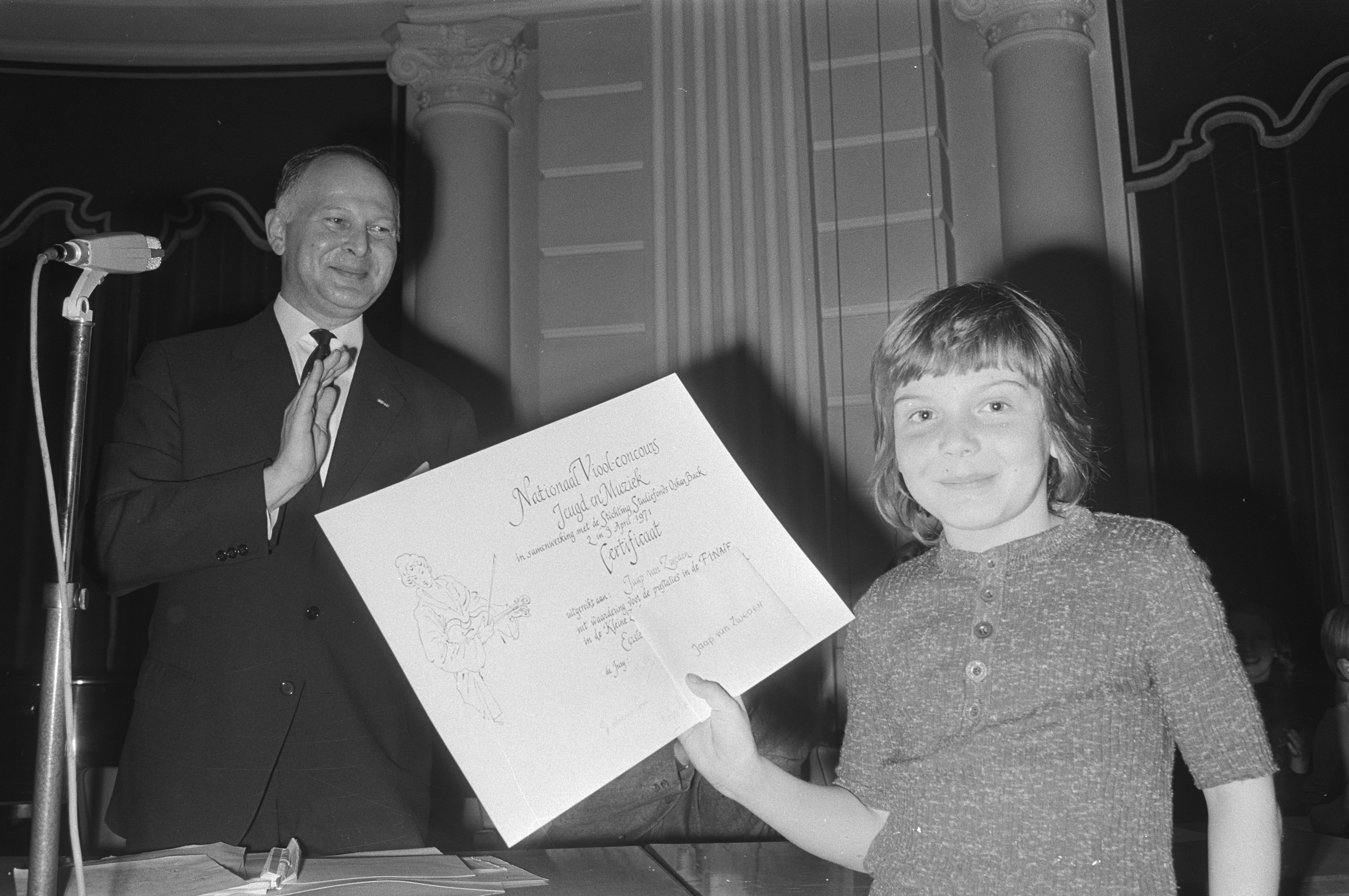 Collectie / Archief : Fotocollectie Anefo Reportage / Serie : Prijsuitreiking van het Nationaal Vioolconcours voor jonge amateurs Beschrijving : Jongste winnaar Jaap van Zweden, links Theo Olof Datum : 3 april 1971 Trefwoorden : concoursen, kinderen, musici, prijsuitreikingen Persoonsnaam : Olof, Theo, Zweden, Jaap van Fotograaf : Fotograaf Onbekend / Anefo Auteursrechthebbende : Nationaal Archief Materiaalsoort : Negatief (zwart/wit) Nummer archiefinventaris : bekijk toegang 2.24.01.05 Bestanddeelnummer : 924-4232